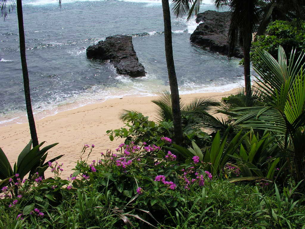 Praia de Santo António, no ilhéu das Rolas, em S. Tomé.